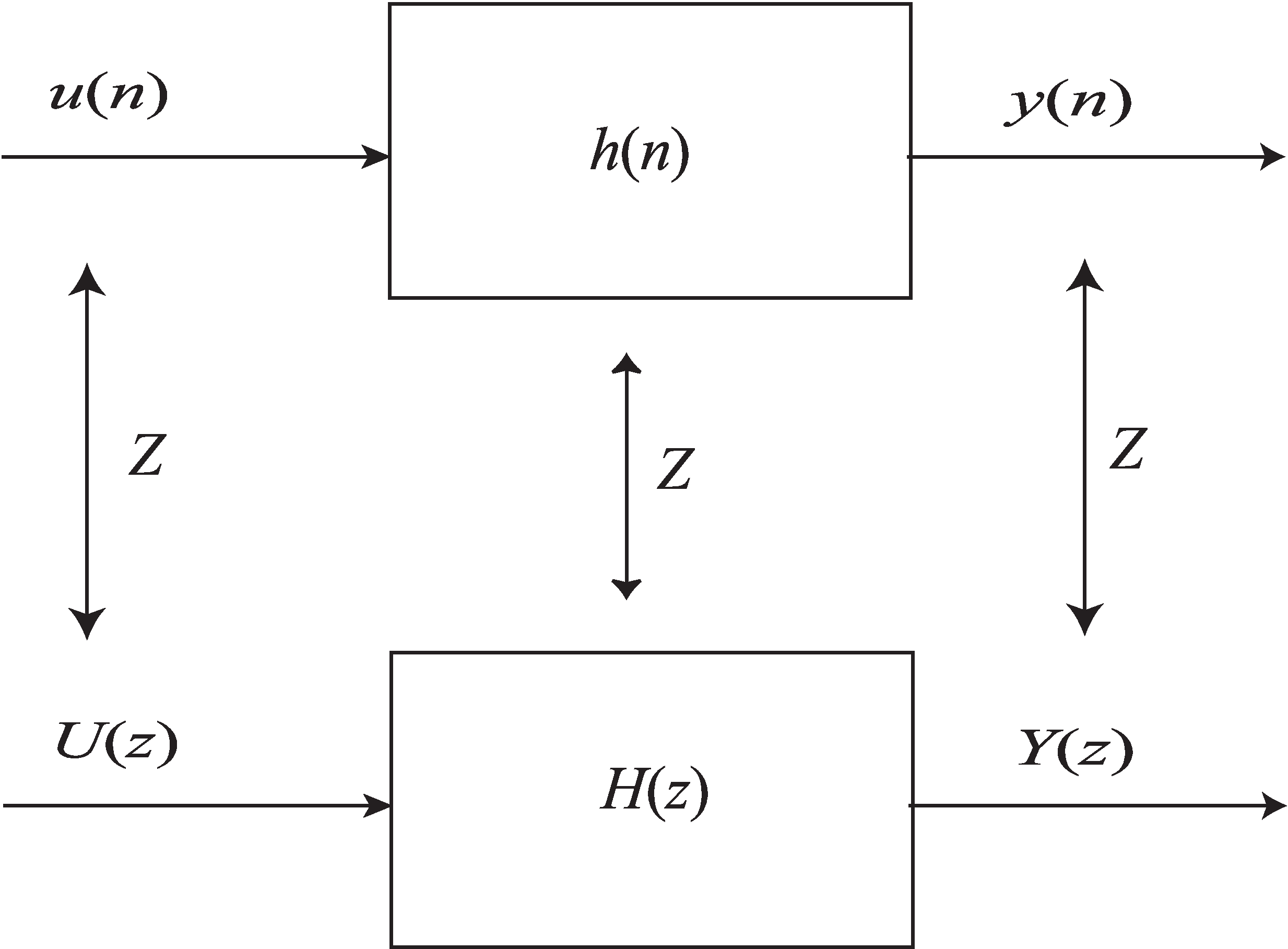 Samanhengen mellom tidsdiskret impulsrespons og transferfunksjon.